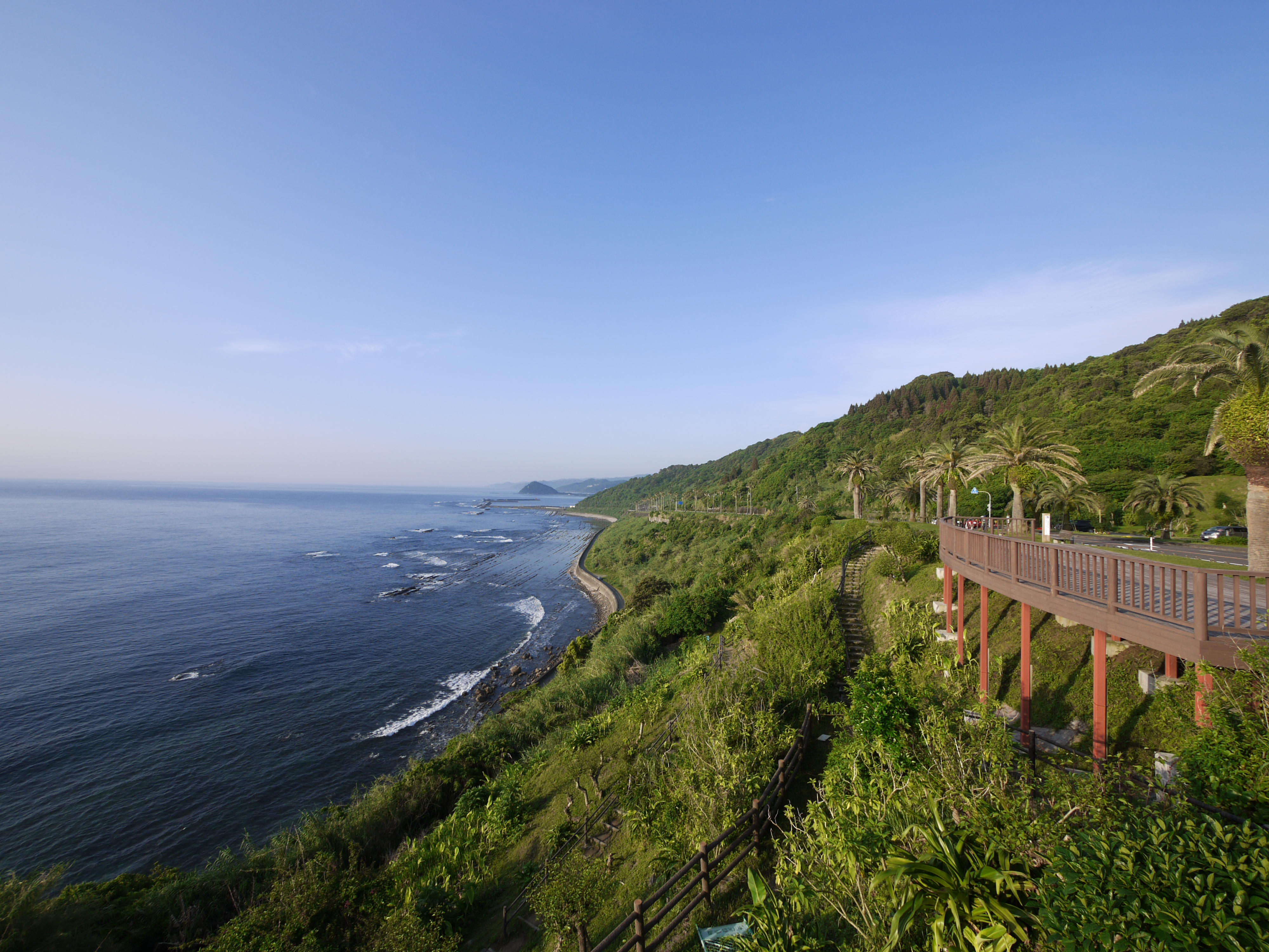 日南海岸 堀切峠・道の駅フェニックス付近